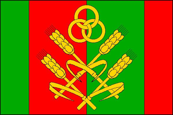 Vlajka obce Jenišovice (okres Chrudim)